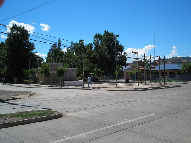 Calles de Pelequén